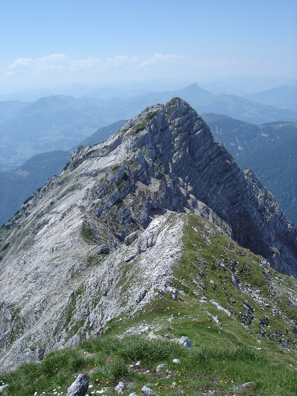 Eindruck auf dem Nuaracher Höhenweg, Blickrichtung Südwesten, im Vordergrund das Seehorn, im Mittelgrund das Kalksteinmassiv, im Hintergrund das Kitzbühlerhorn